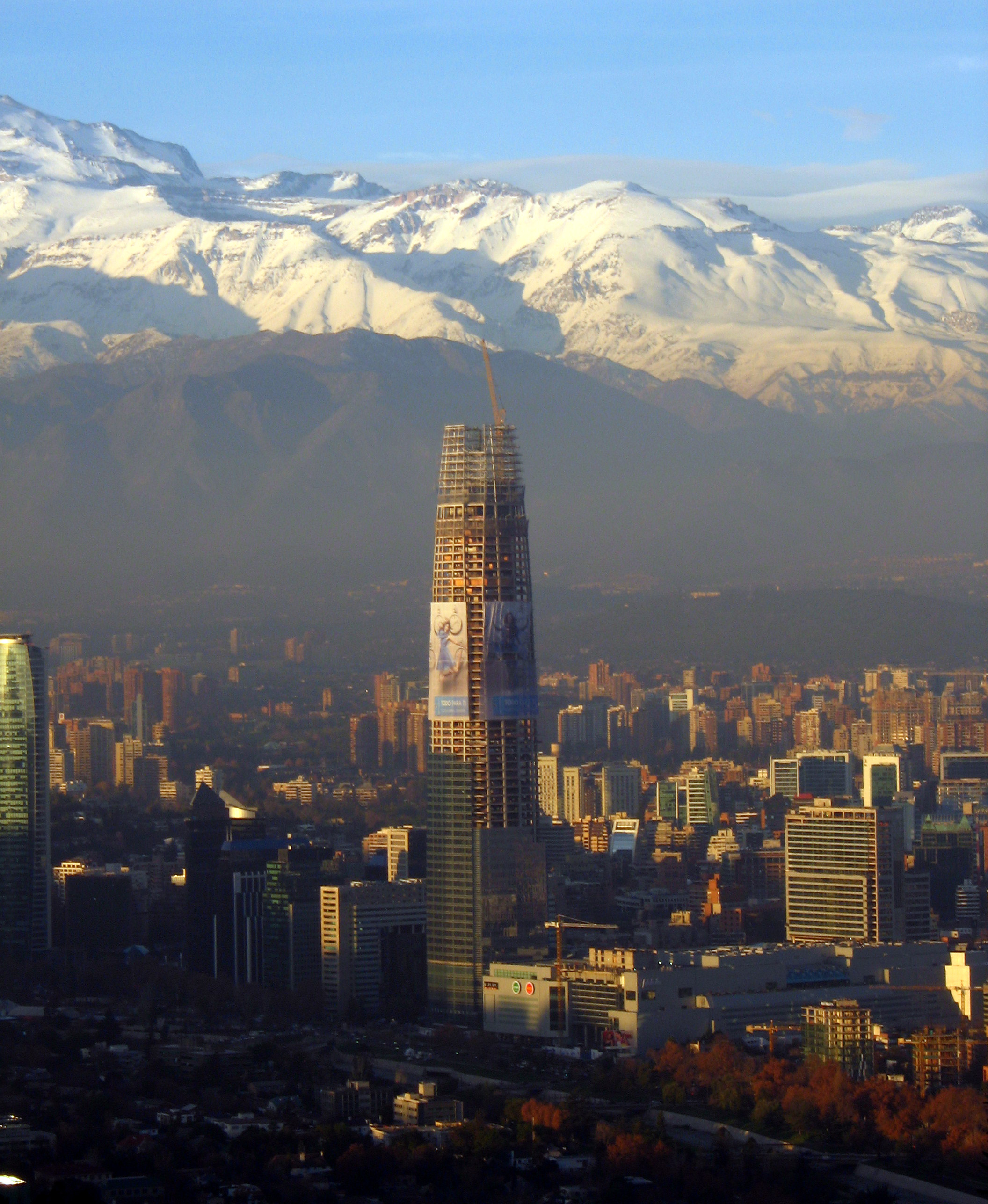 Costanera Center, Santiago, Chile, en junio de 2012.